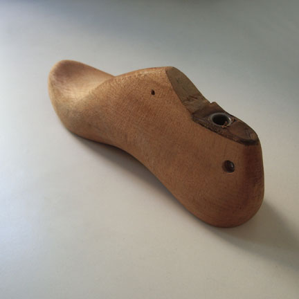 Puidust kingaliist